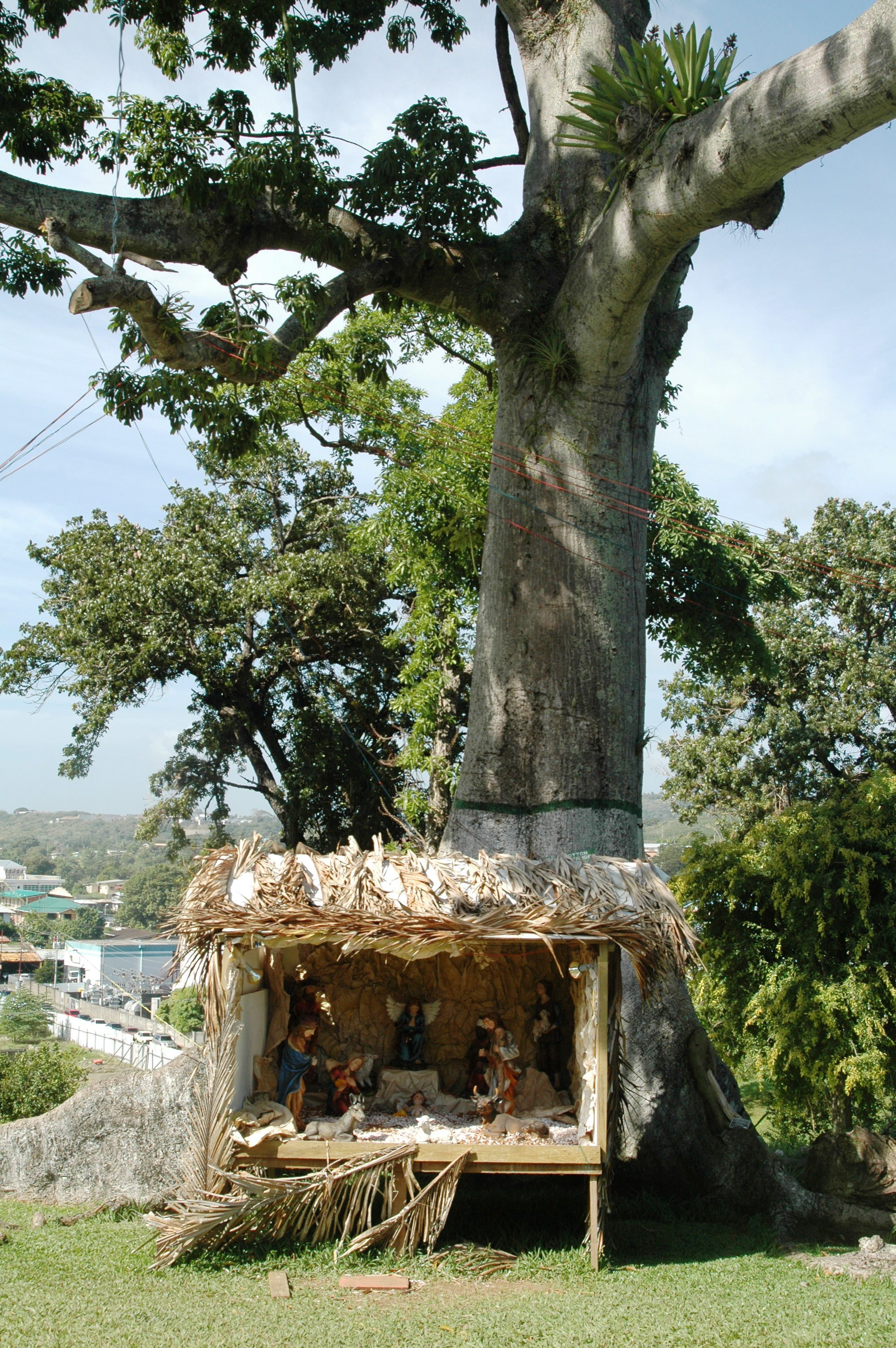 Weihnachtskrippe im Botanischen Garten von Scarborough, Tobago